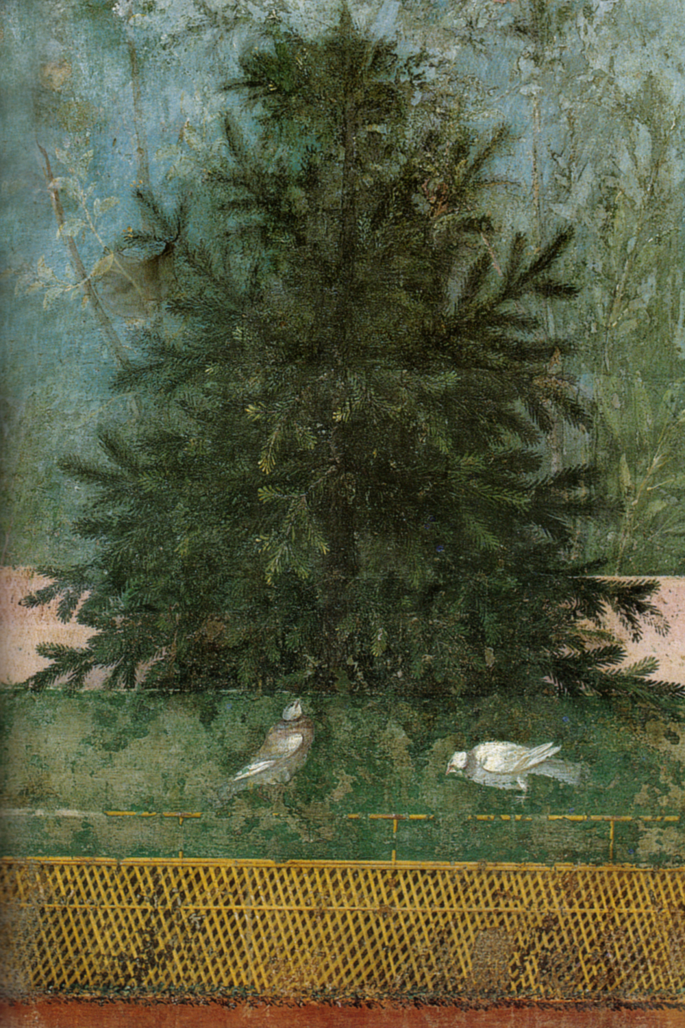 Villa di livia, affreschi di giardino, parete lunga occidentale, abete